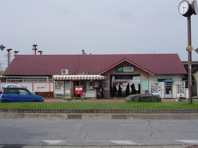 八街駅旧駅舎